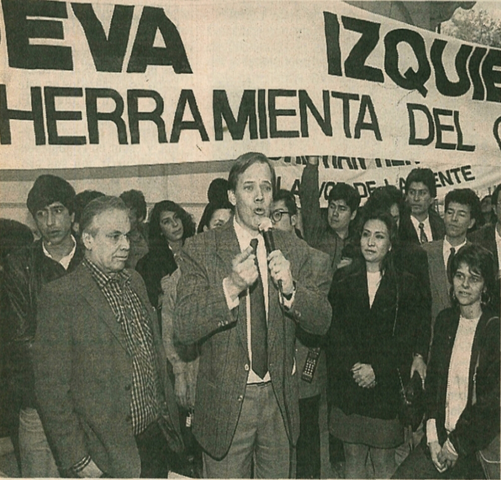 Implementación de la coalición La Nueva Izquierda.